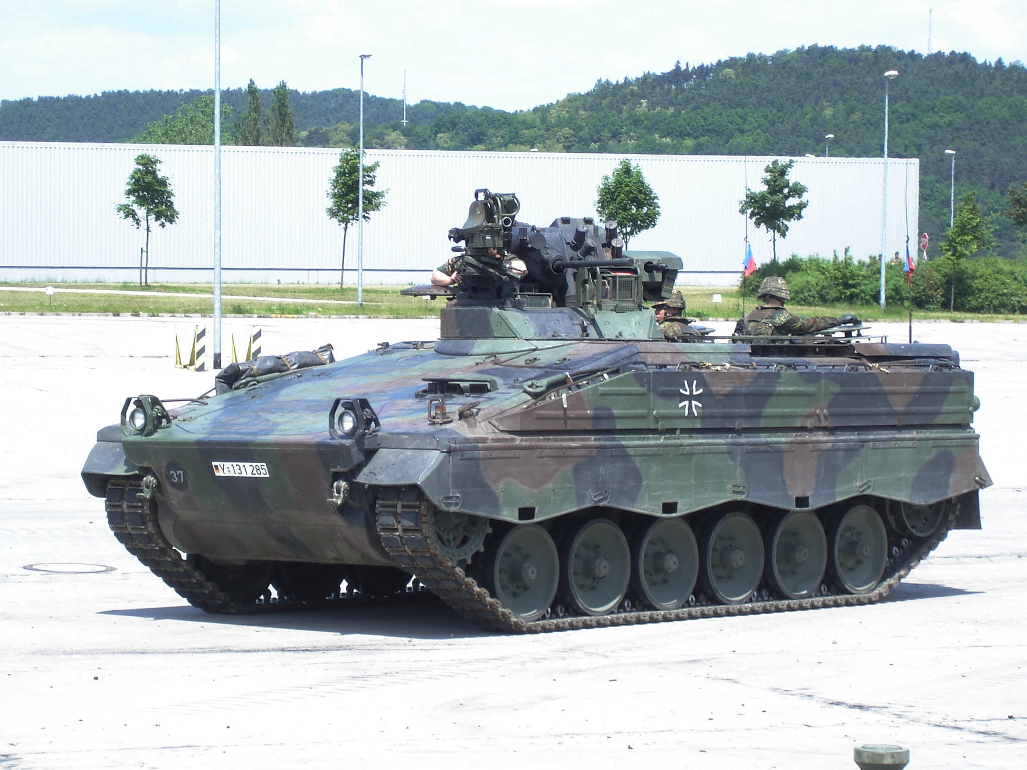 Marder1A3 des 4./Panzergrenadierbataillon 391 bei einer dynamischen Waffenshow.